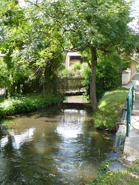 Eclimont